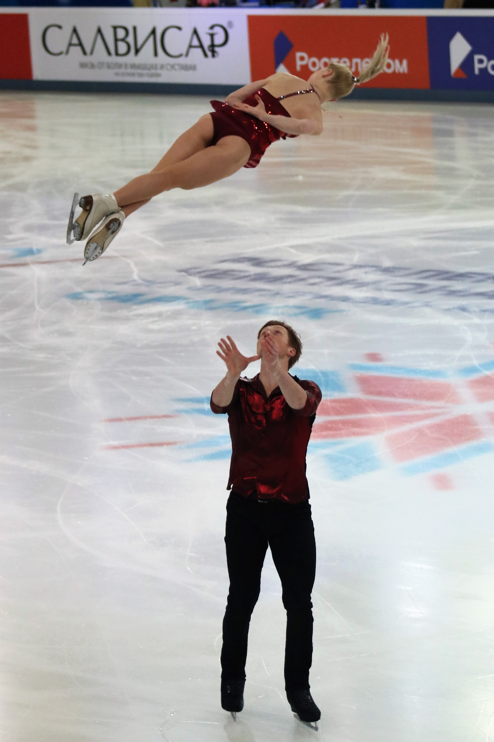 Евгения Тарасова / Владимир Морозов на чемпионате России по фигурному катанию на коньках 2019